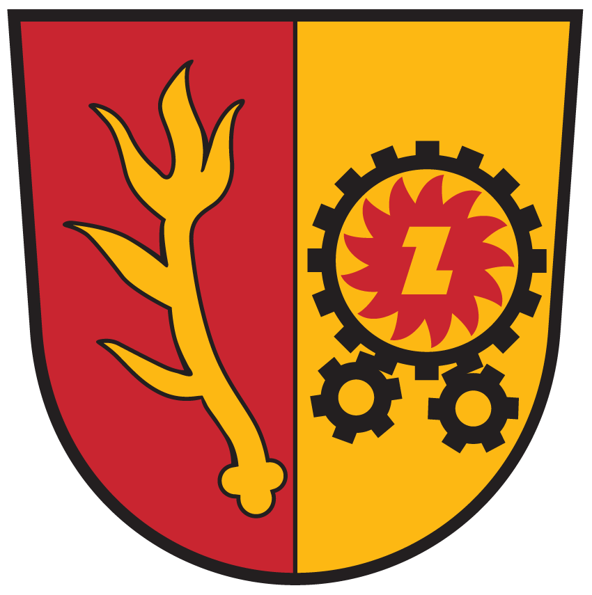 Wappen von Klein St. Paul